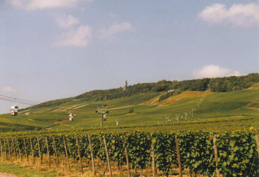 Blick auf das Niederwalddenkmal bei Rüdesheim am Rhein, de:1999. Steffen Mokosch